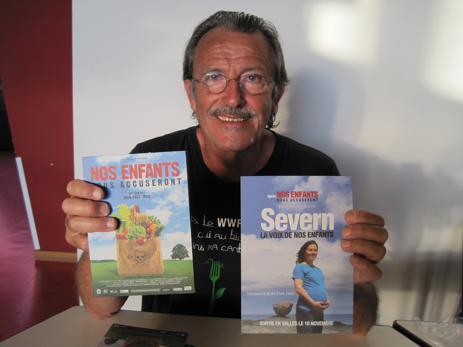 Jean-Paul Jaud, faisant la promotion de ses deux films à Oyonnax.